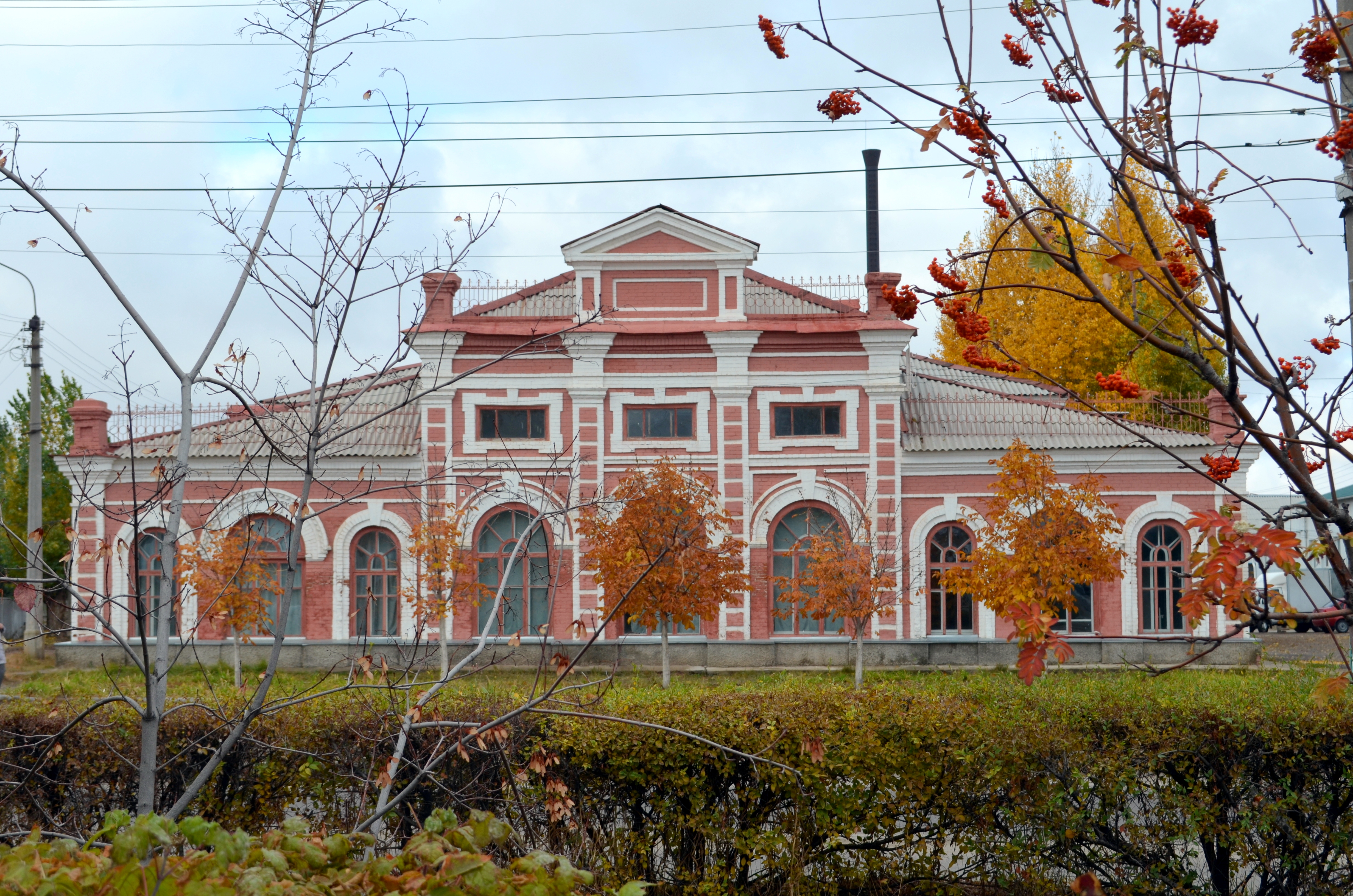 Народный дом: улица Зелёная, 20, Камышин, Волгоградская область